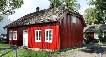 Malmskrivergården i Sandvika.